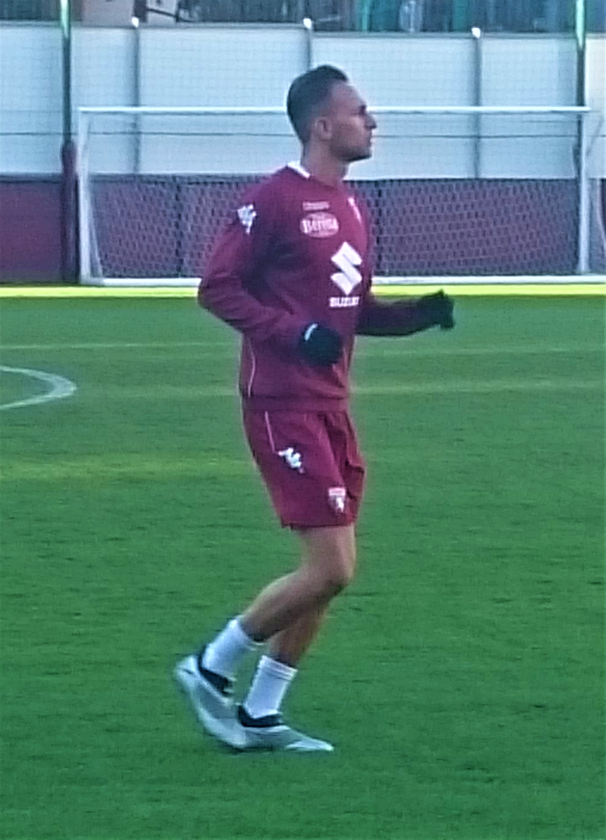 Il calciatore del Torino Simone Edera durante una sessione di allenamento sul campo secondario del Filadelfia.